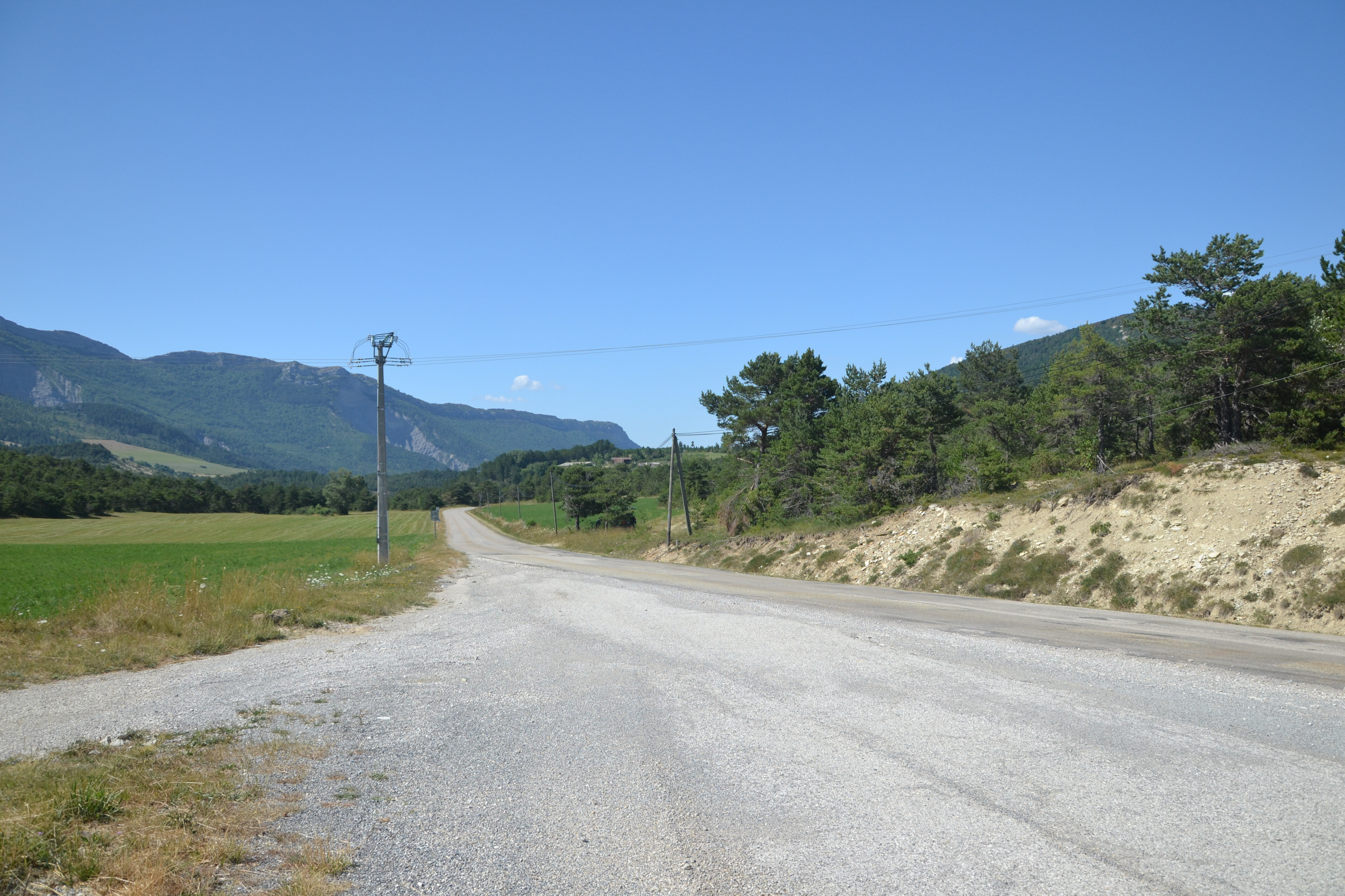 Col de Prémol, sur la route RD 61 entre Jonchères et Bellegarde en Diois